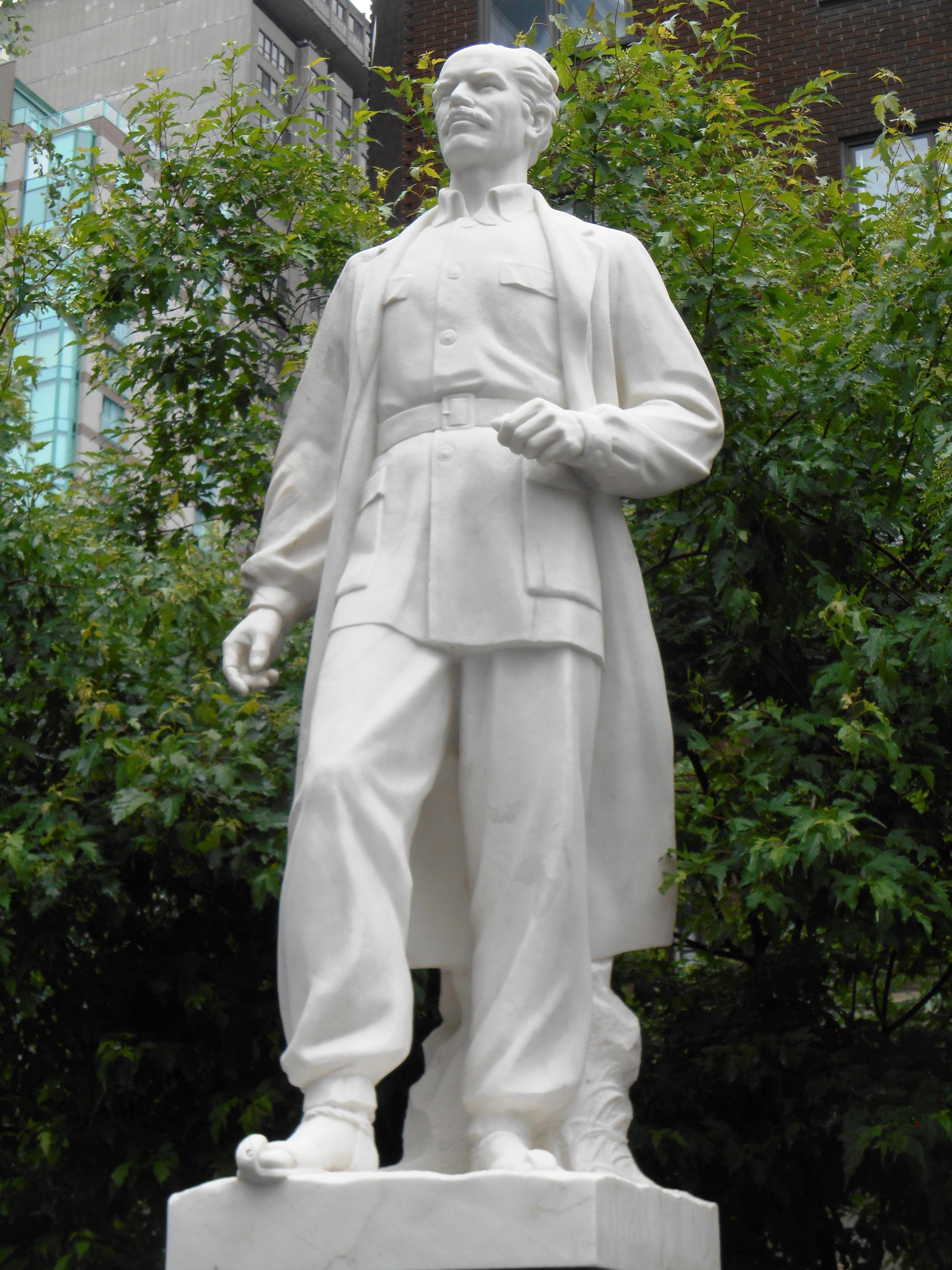 Place Norman-Bethune à Montréal, à l'est de la rue Guy et au nord du boulevard de Maisonneuve